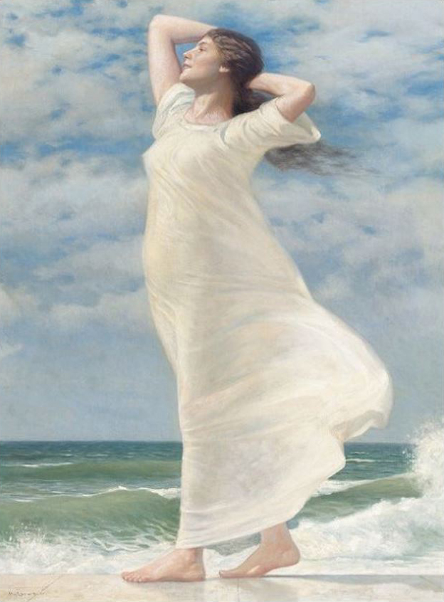 Max Nonnenbruch, Meerwinde, Öl auf Leinwand, 79,5 × 108,5 cm